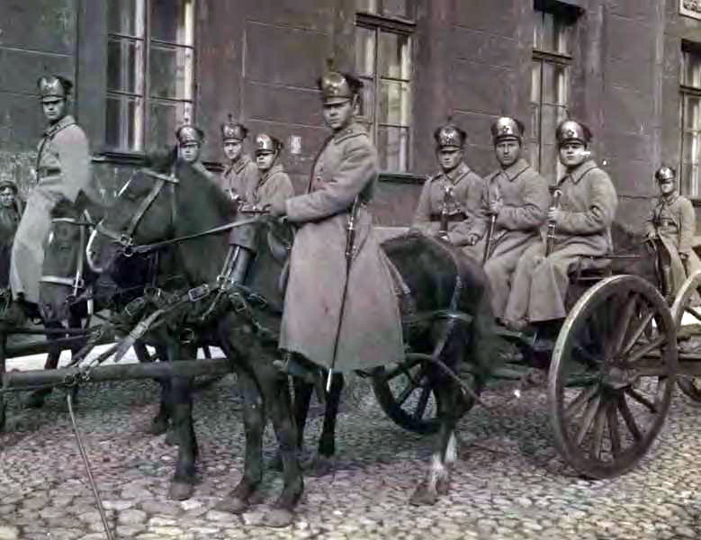 1-е Советские артиллерийские командные курсы